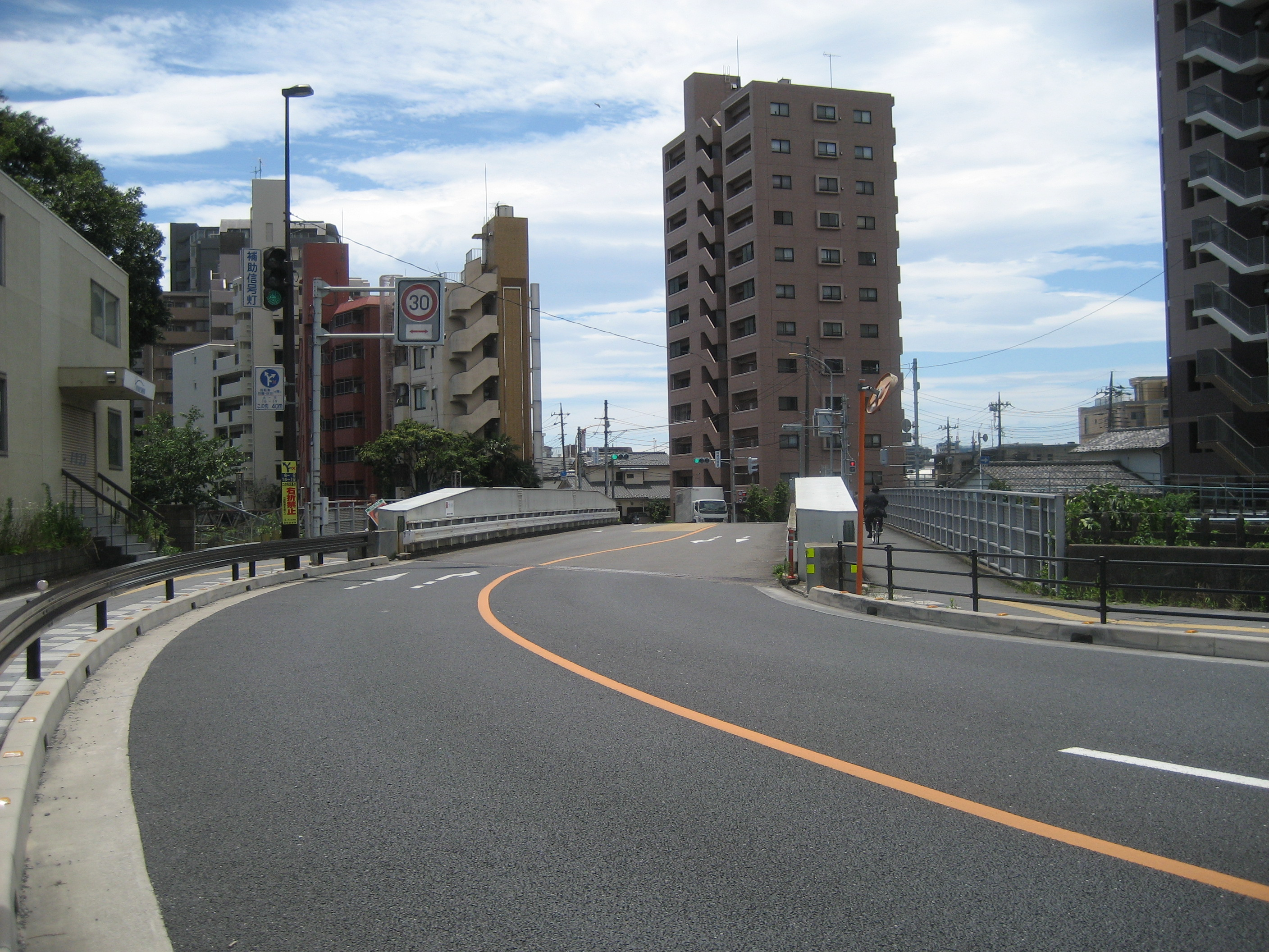 埼玉県道65号線浦和区浦和橋（北浦和駅方面側から撮影）